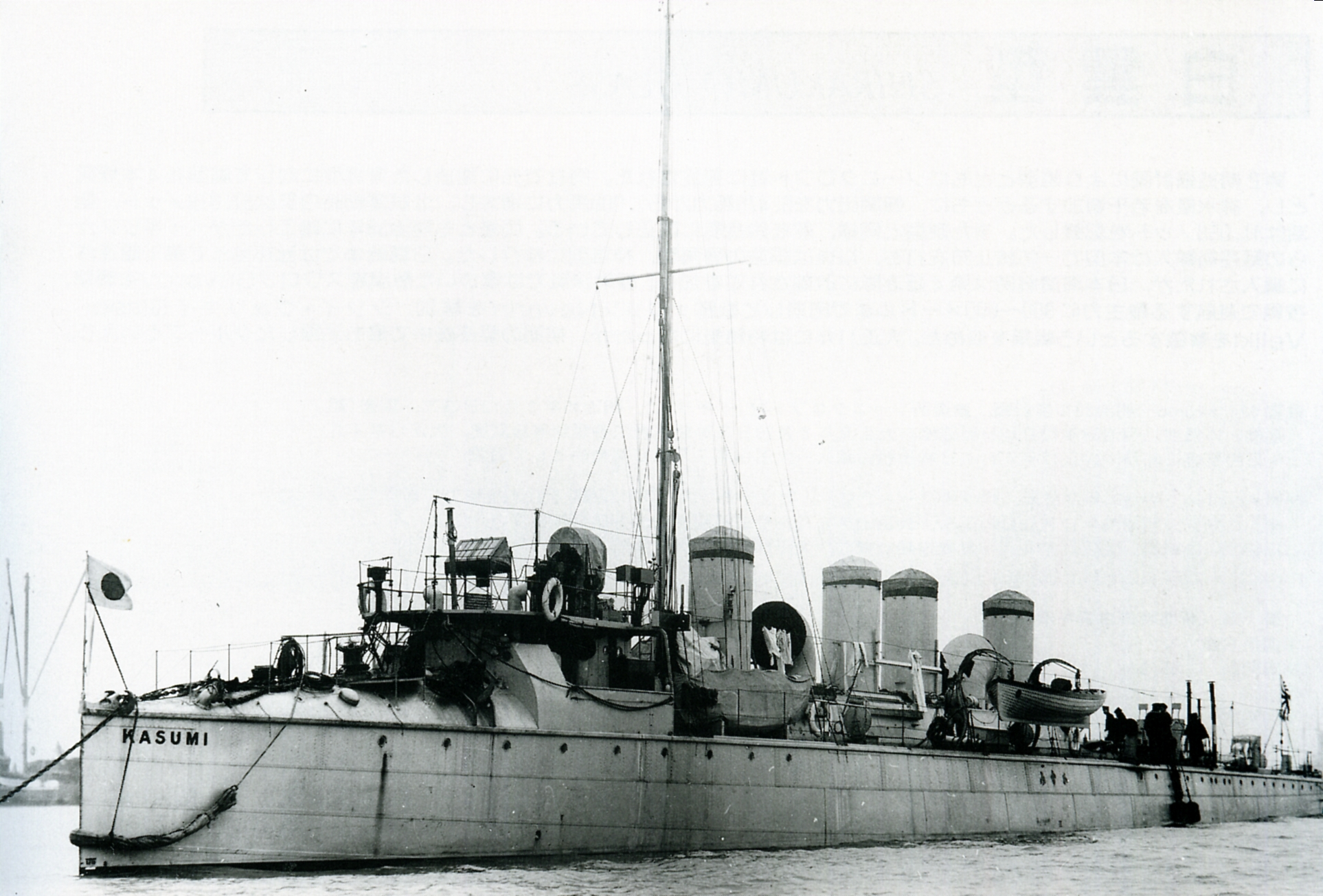 Japanese destroyer Kasumi at Clyde, 1902